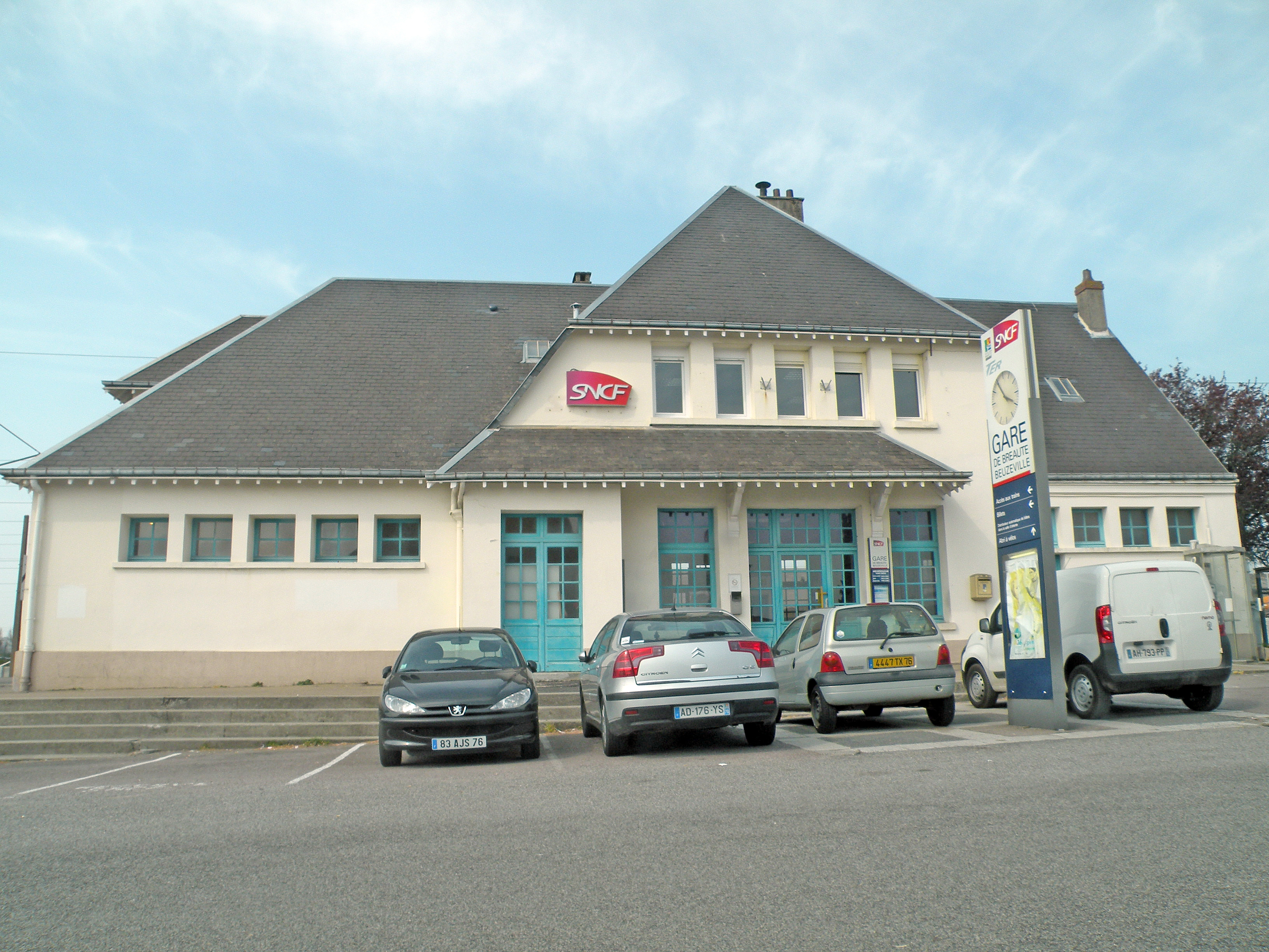 La gare de Bréauté-Beuzeville à Bréauté.